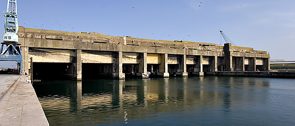 Base sous marine (WWII) du port de La Pallice vue Ouest. Pep.per de Ré Photo issue de ma banque d'images